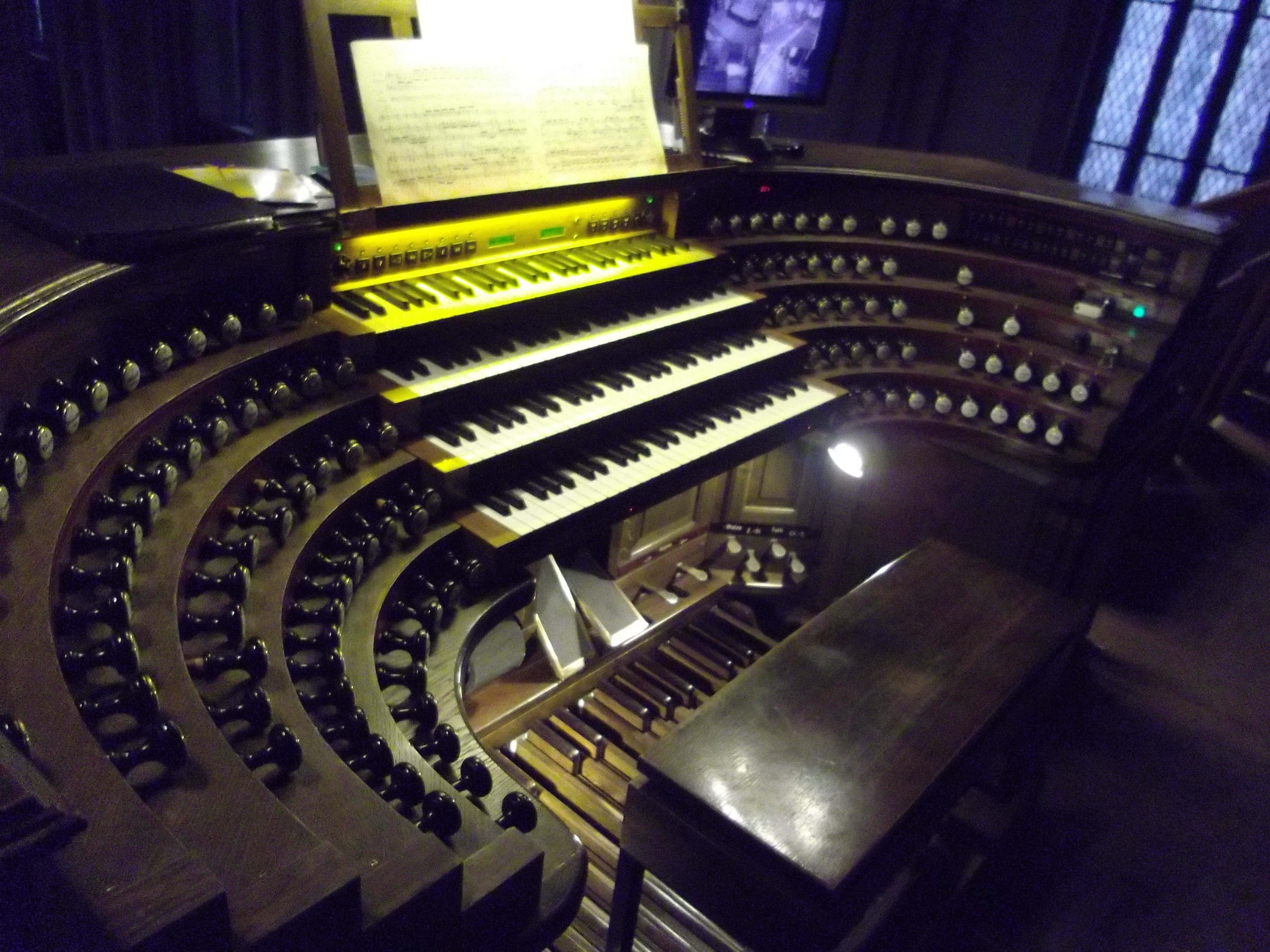 Spieltisch der Orgel der Marktkirche Wiesbaden